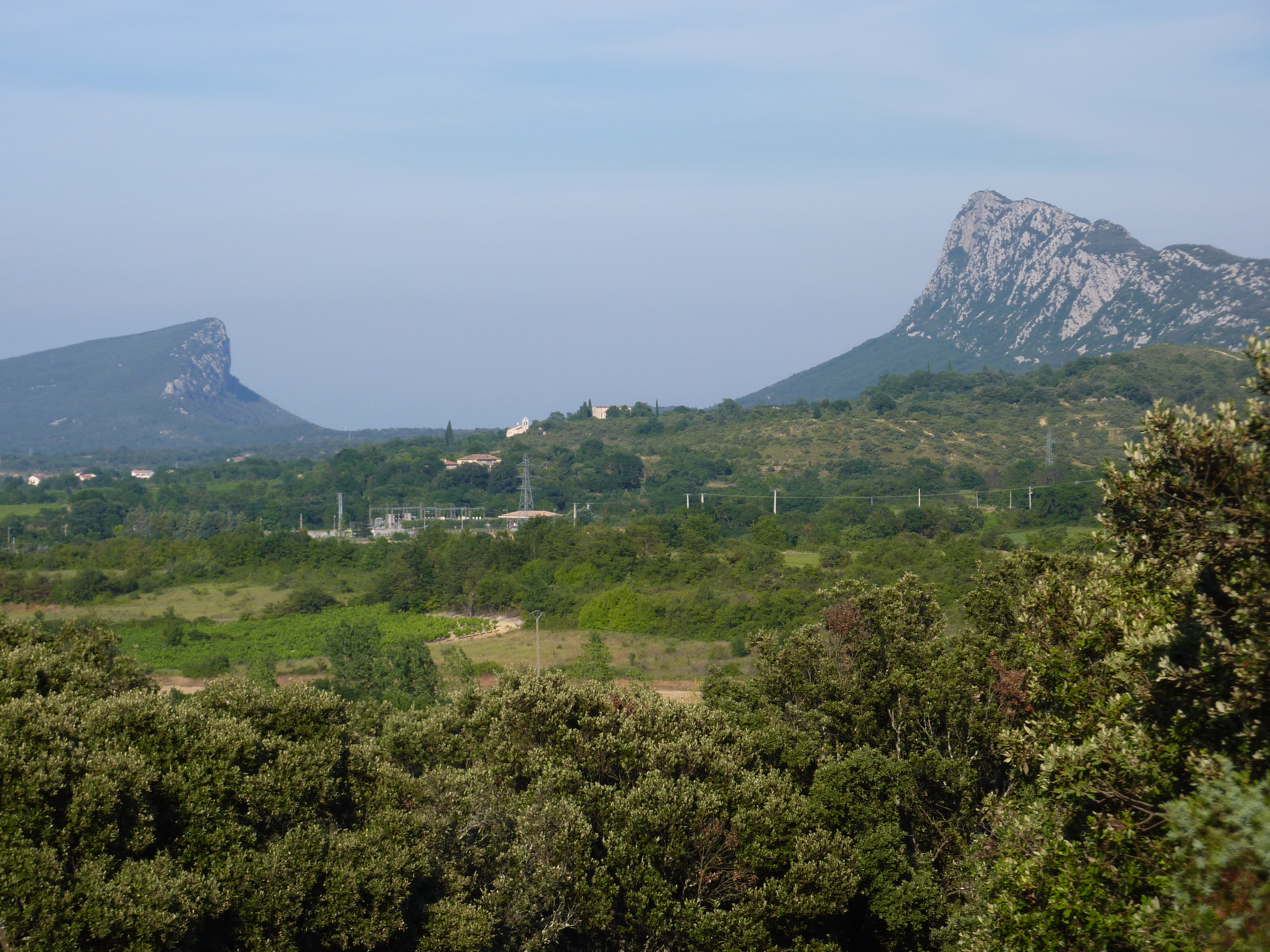 Le pic Saint-Loup et la montagne d'Hortus vus du mas de Jouis en Saint-Martin-de-Londres